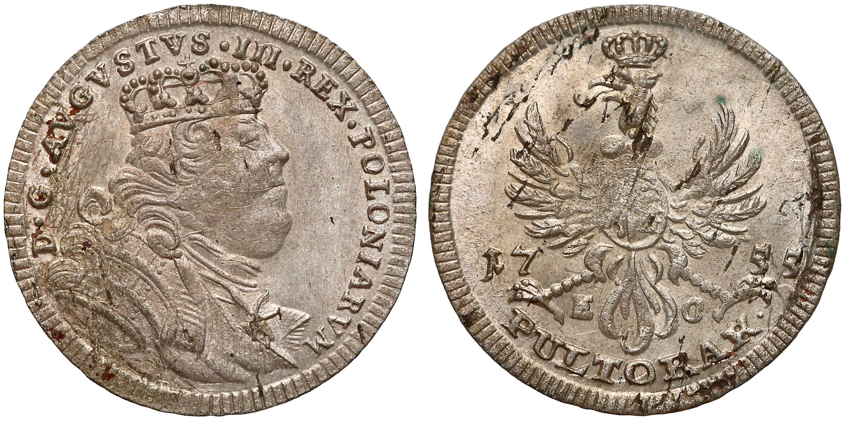 Półtorak koronny 1755 Lipsk